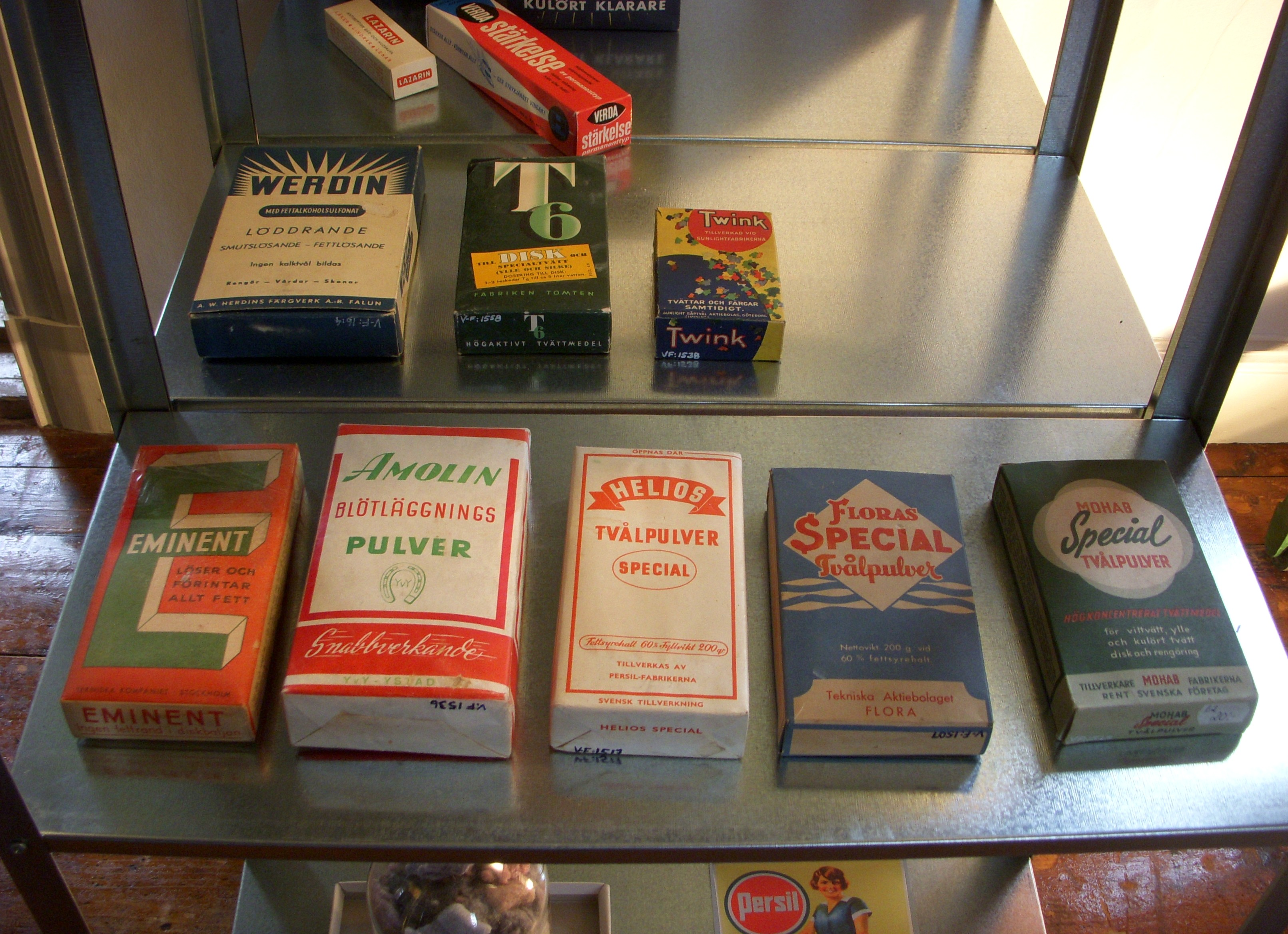 Hagalunds Tvätterimuseum i Huddinge